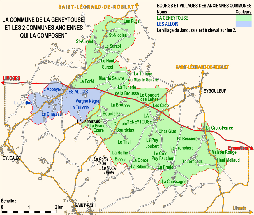 Carte de la commune de La Geneytouse et des 2 communes qui la composent